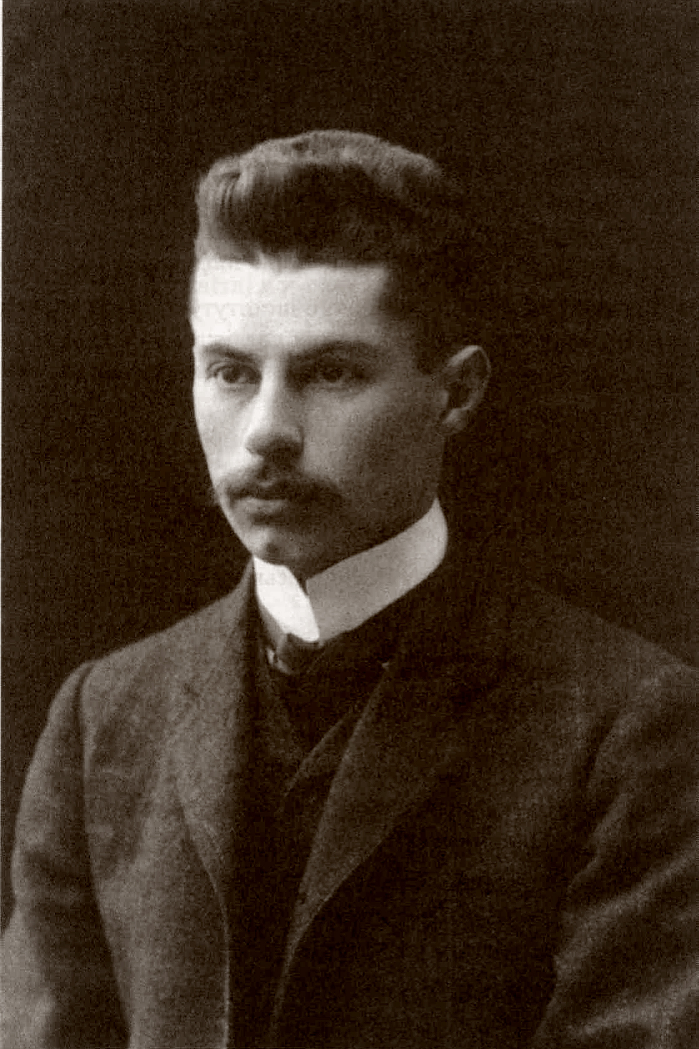 Файл наданий Затурцівським меморіальним музеєм В'ячеслава Липинського